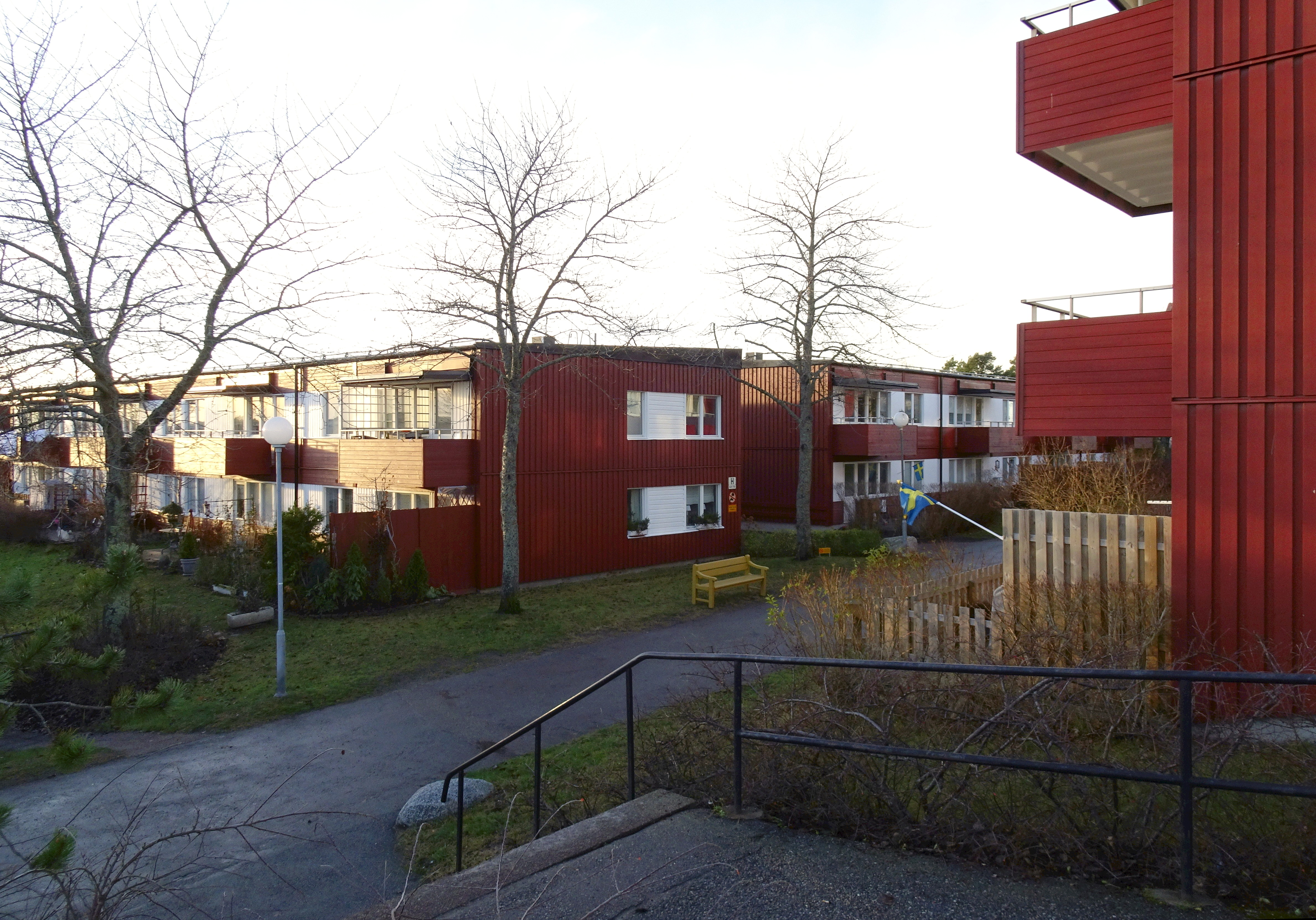 Bostadsområdet Ljuskärrsberget i Saltsjöbaden